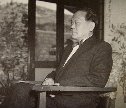 조병옥, 서재에서의 망중한